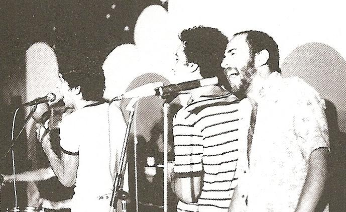 Es una foto del grupo musical argentino Patricio Rey y sus Redonditos de Ricota.